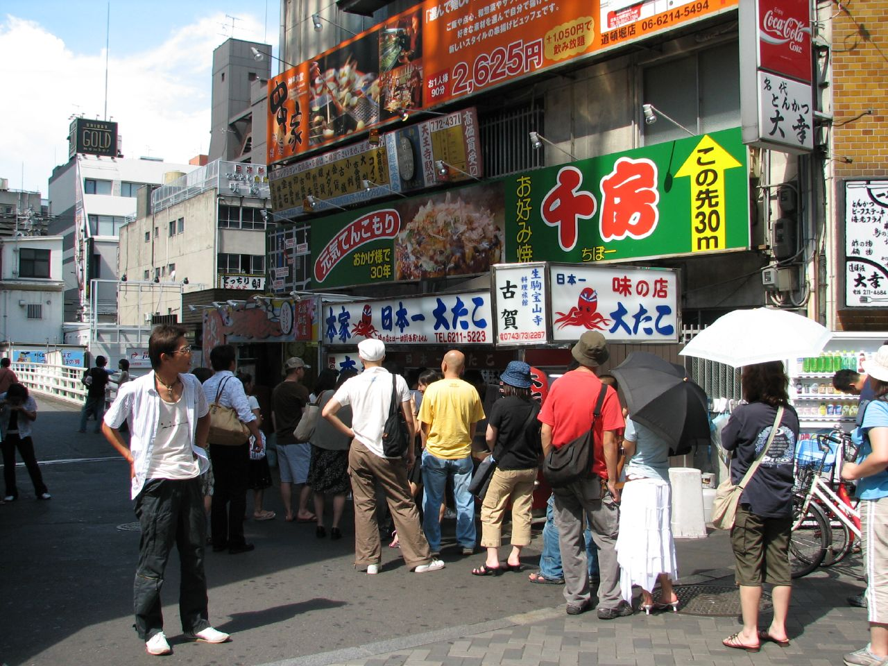 日本第一大的章魚燒